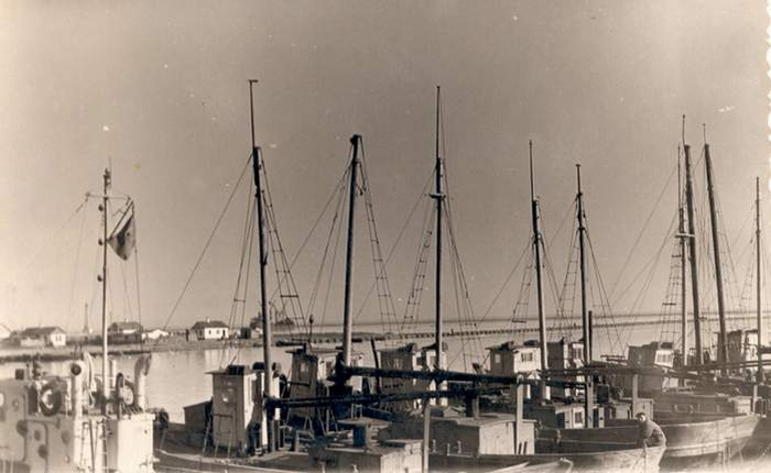 Mariupol old picture